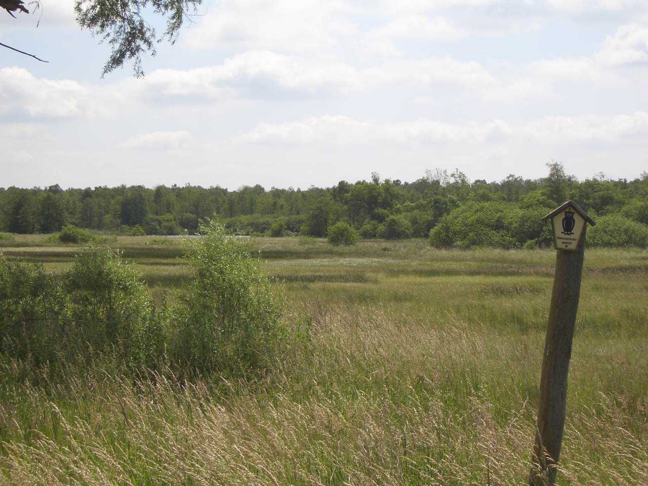 Blick in die Peenewiesen bei Gützkow, Mecklenburg-Vorpommern (Deutschland).